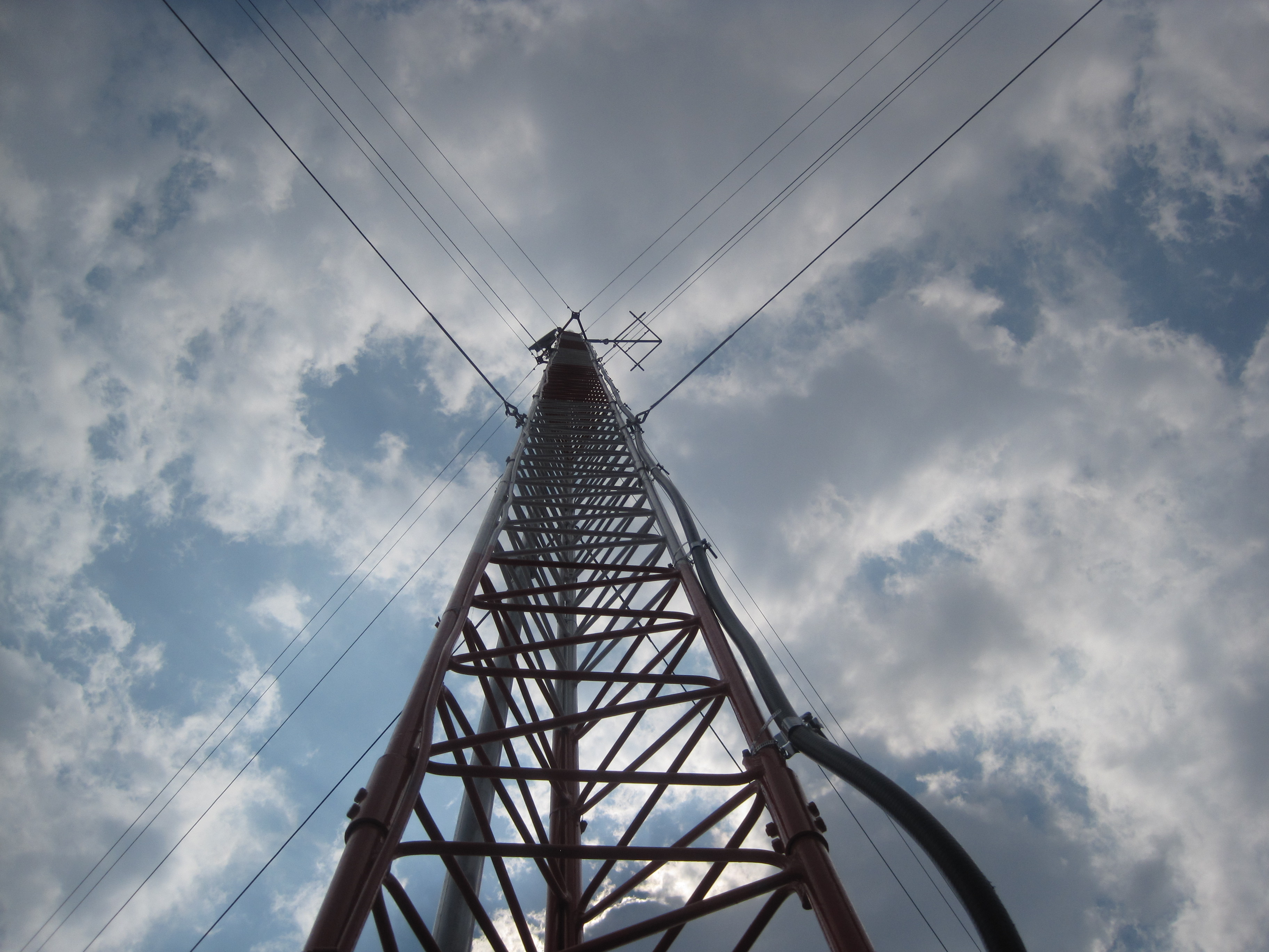 Antena de transmisión XHUAMR-FM